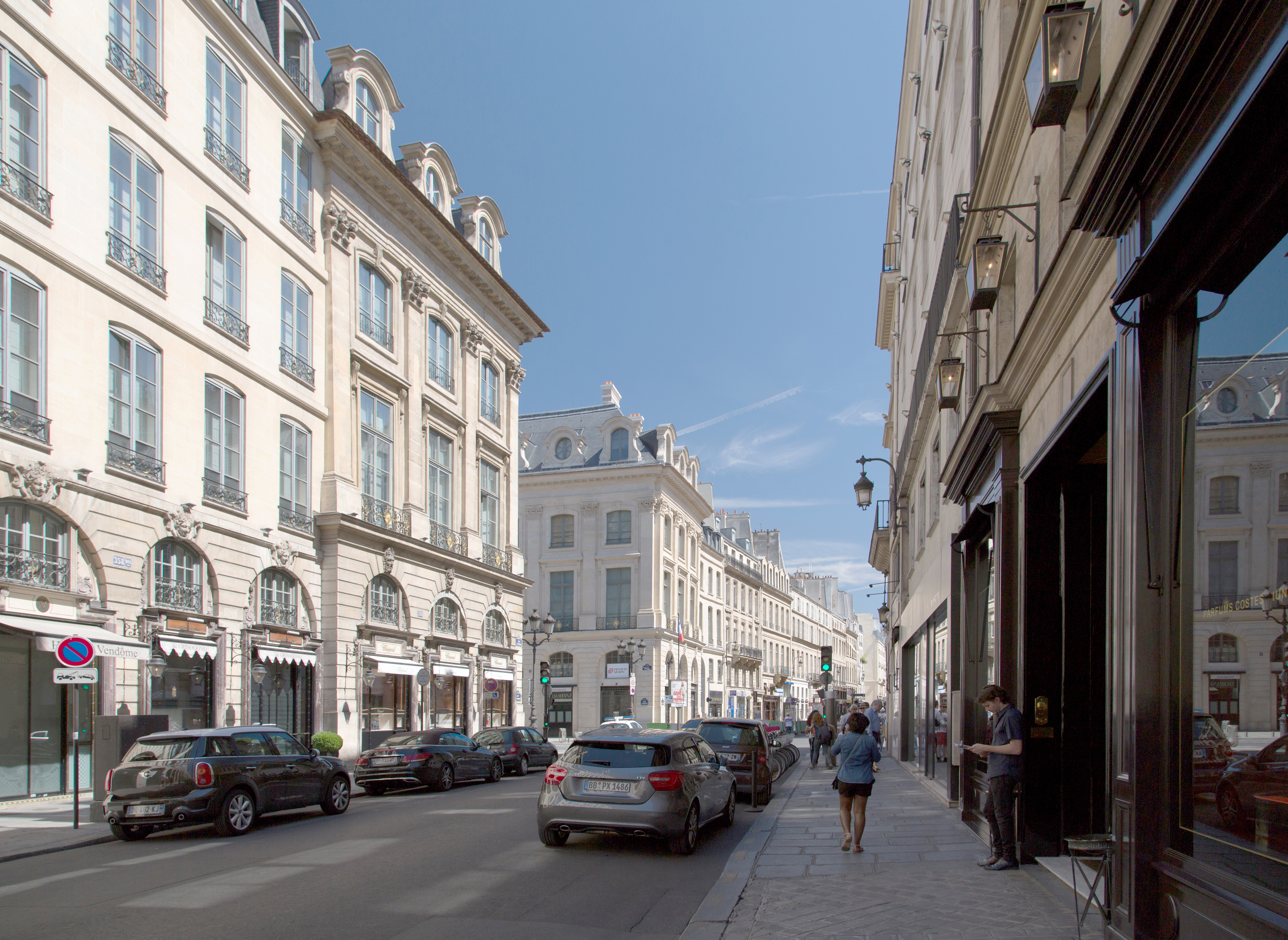 Rue Saint-Honoré, Paris.